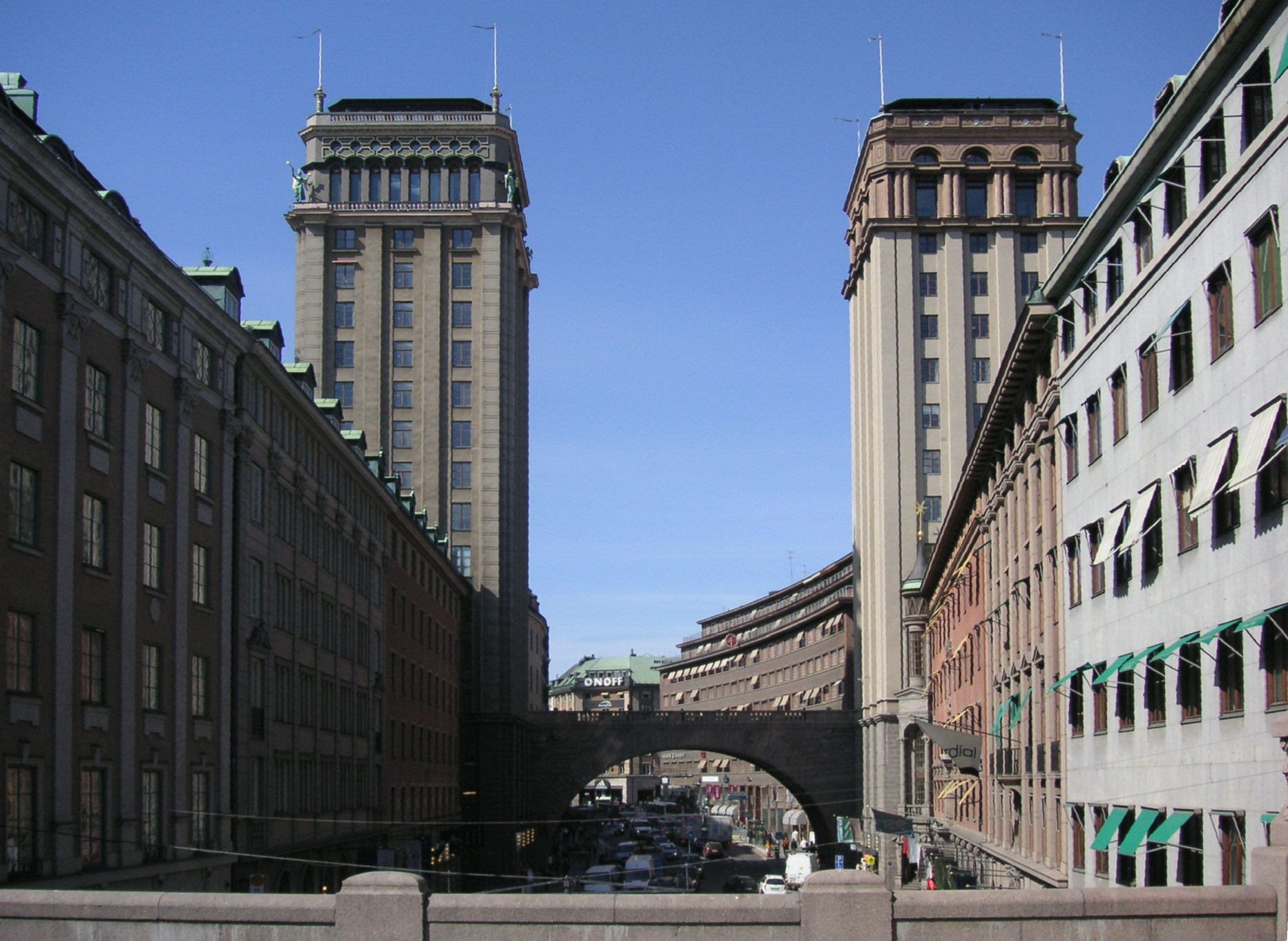 Kungsgatan i Stockholm västerut med Malmskillnadsbron i bakgrunden, vy från Regeringsgatans bro.